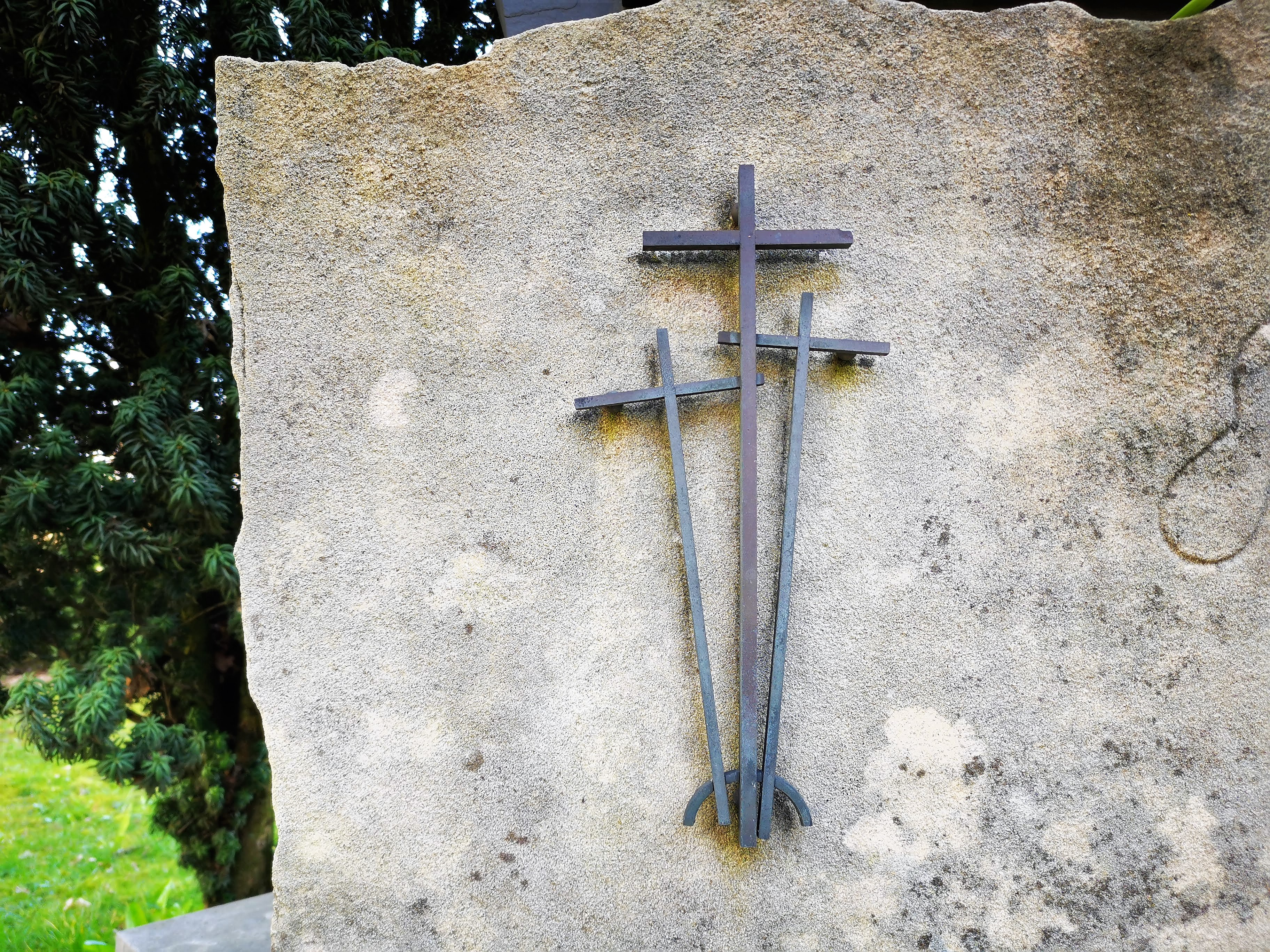 Luxembourg-Gasperich. Le Monument de la déportation civile et militaire, les 3 croix.